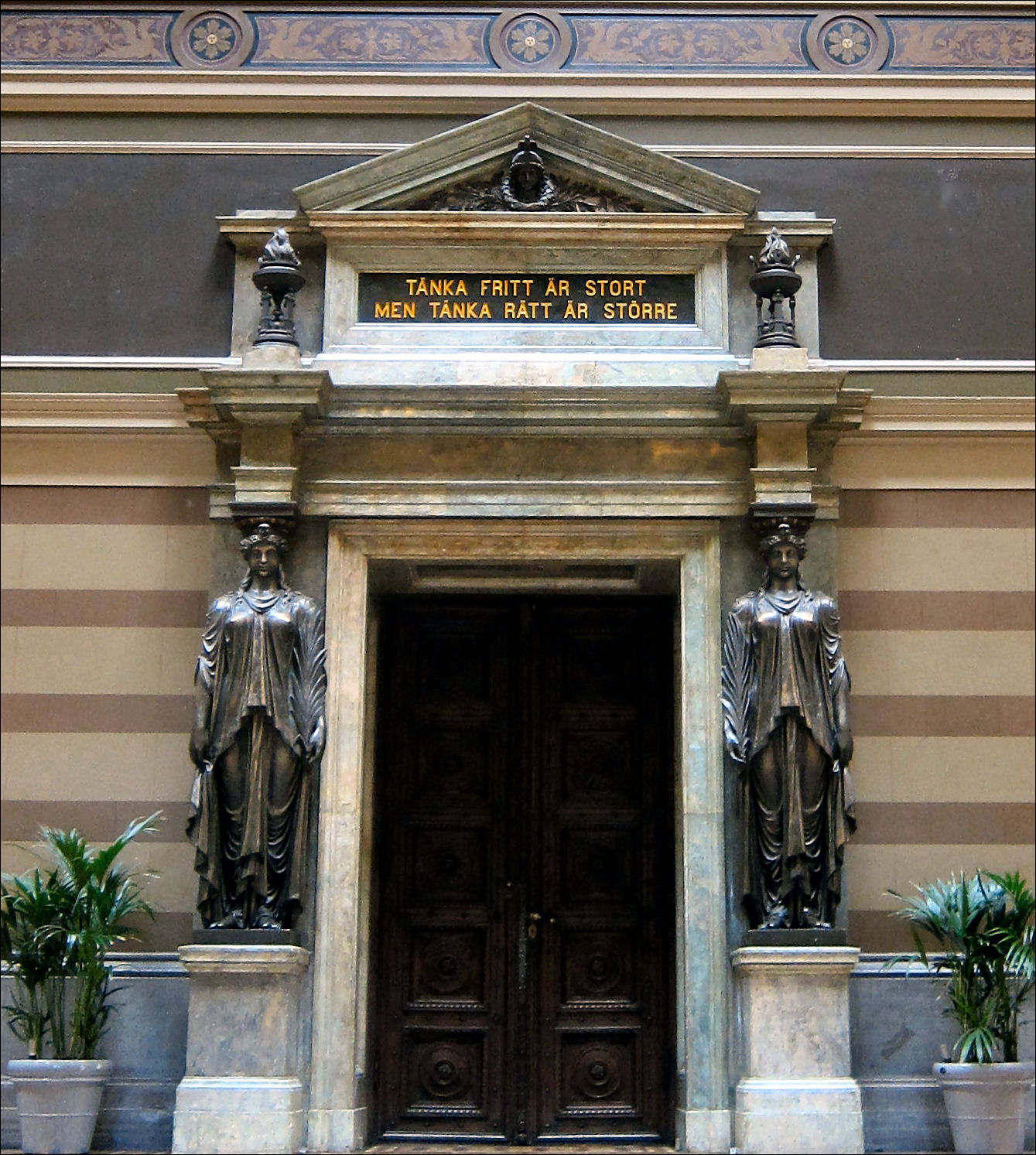 Universitetshuset, Universitetsparken, Gustavianum och Ekermanska huset (Fjärdingen 1:9; f.d. S:t Eriks torg 2)